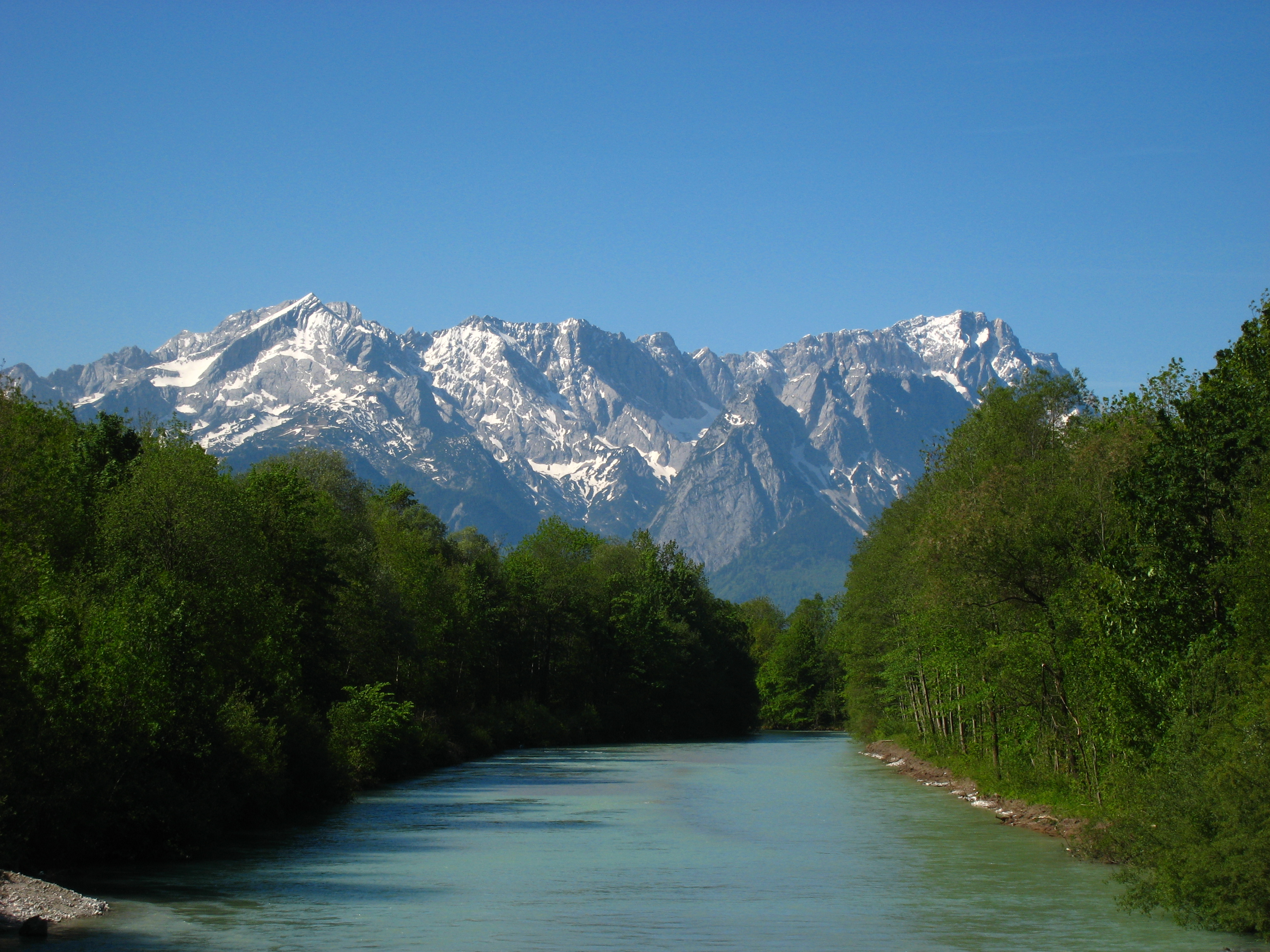 Blick von der Oberauer Loisachbrücke.